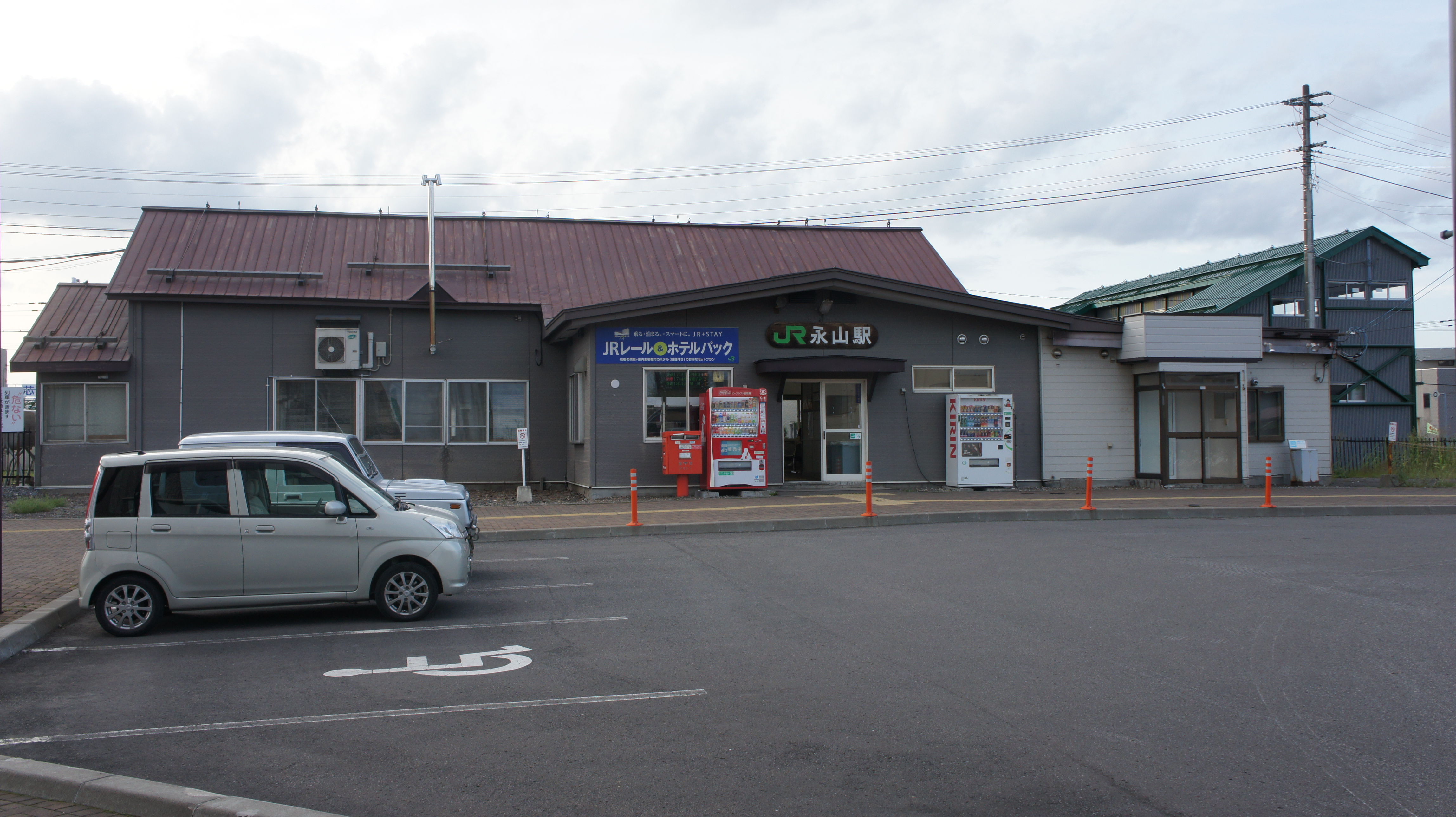 JR宗谷本線・永山駅の駅舎 Sony NEX-3